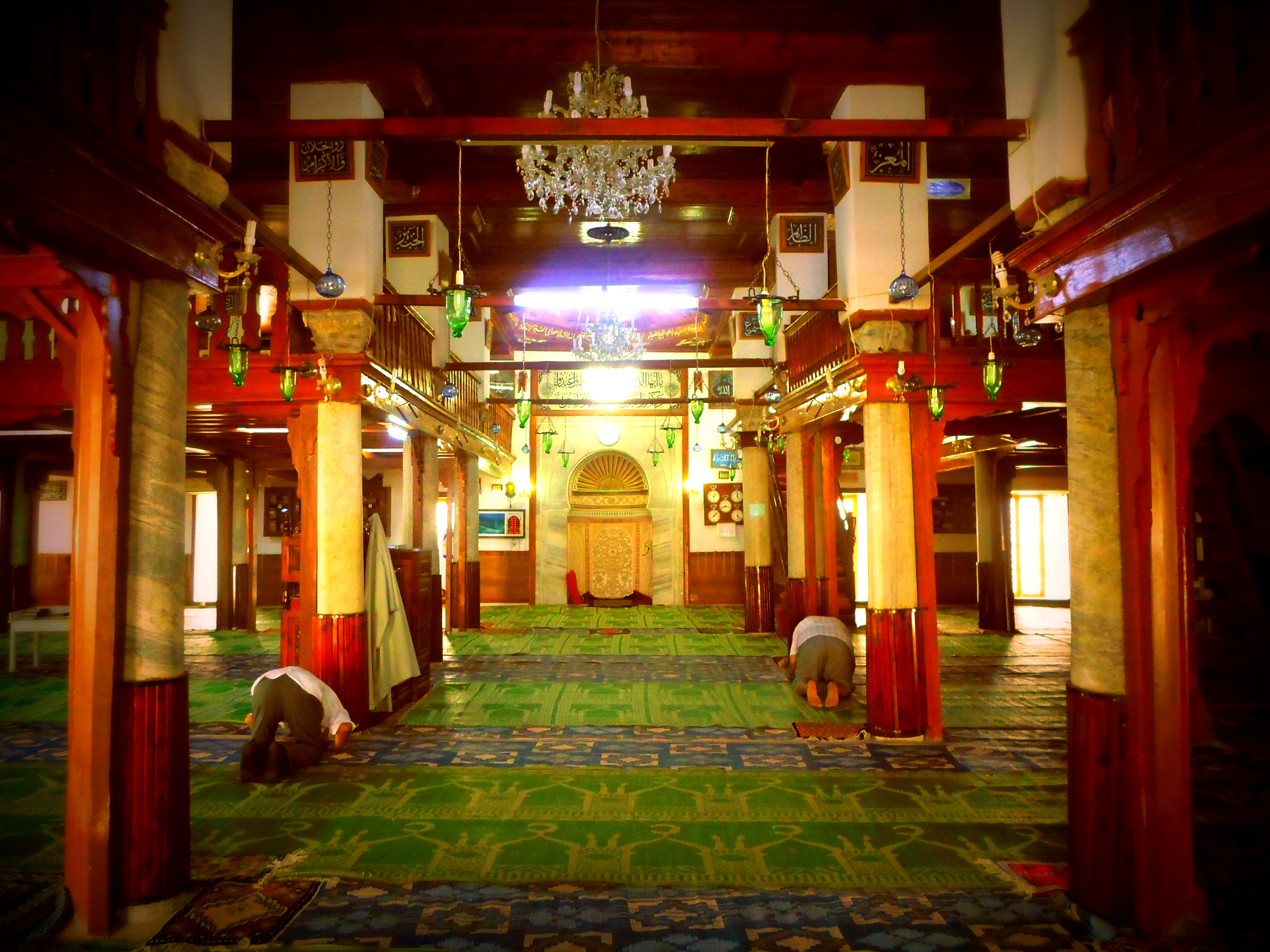 Mosquée du Bey